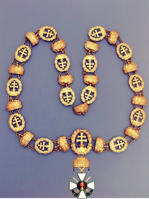 Magyar Érdemrend Szent Koronával ékesített nagykeresztjének lánca (1939)